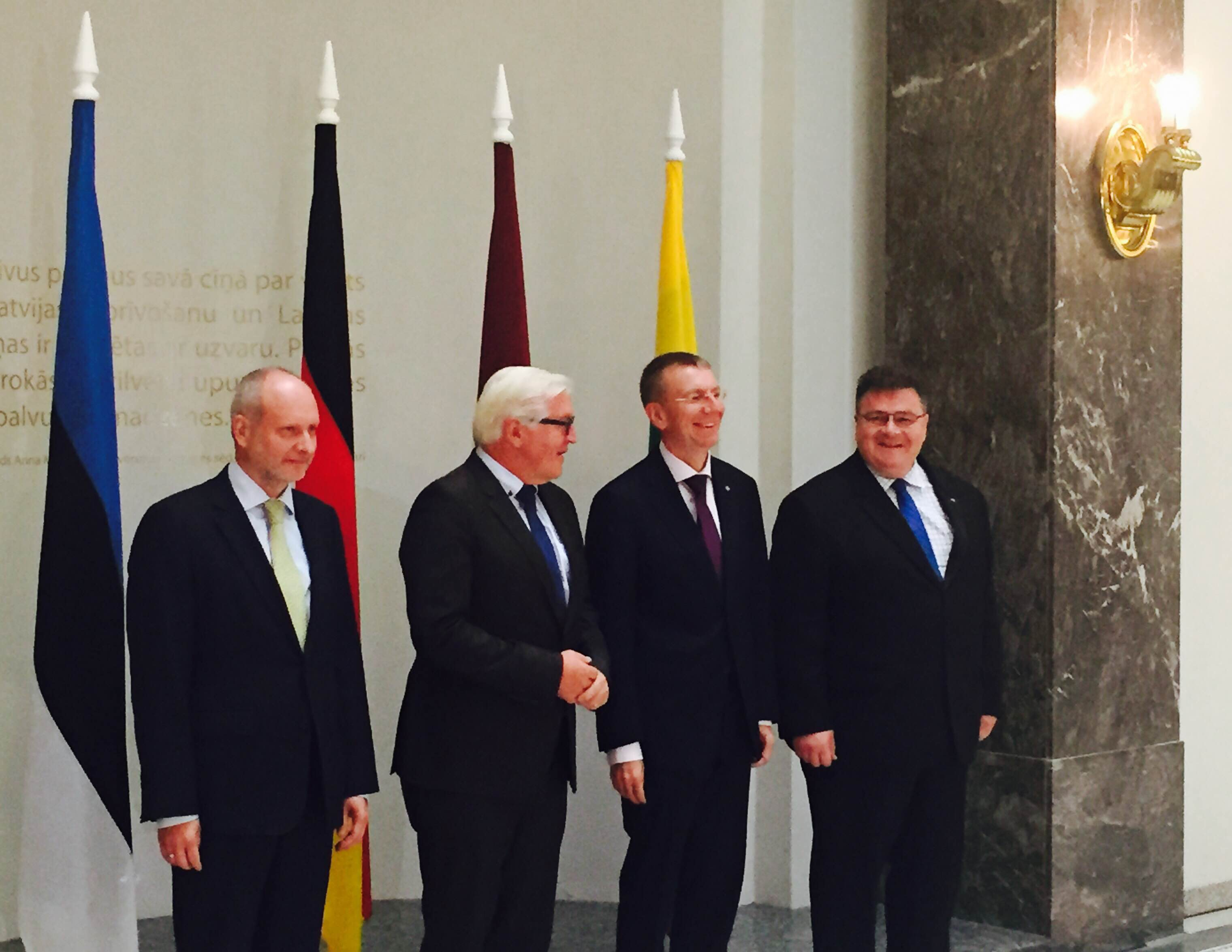 Matti Maasikas Saksamaa ja Balti välisministrite kohtumisel